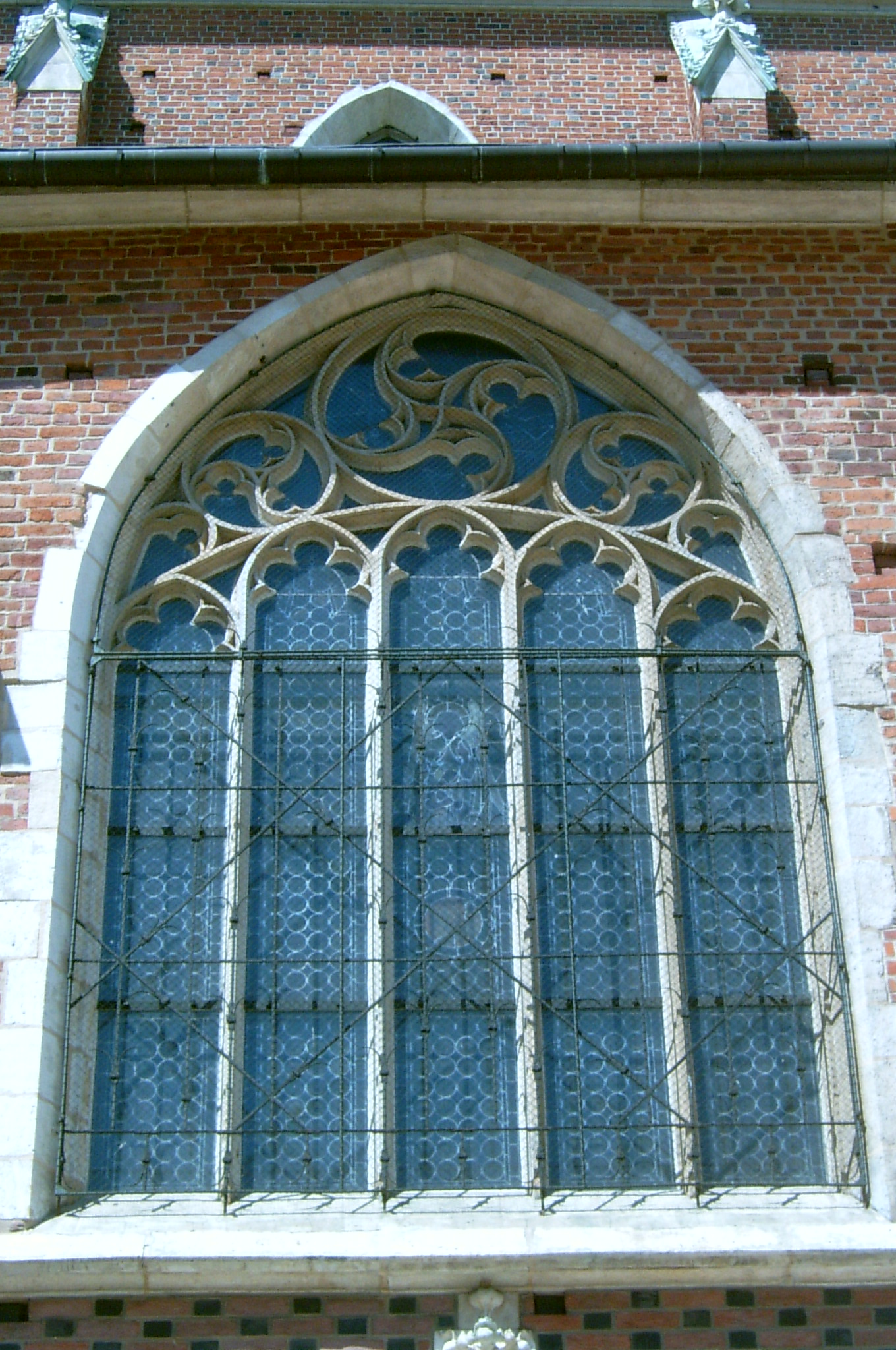 Kraków, Poland